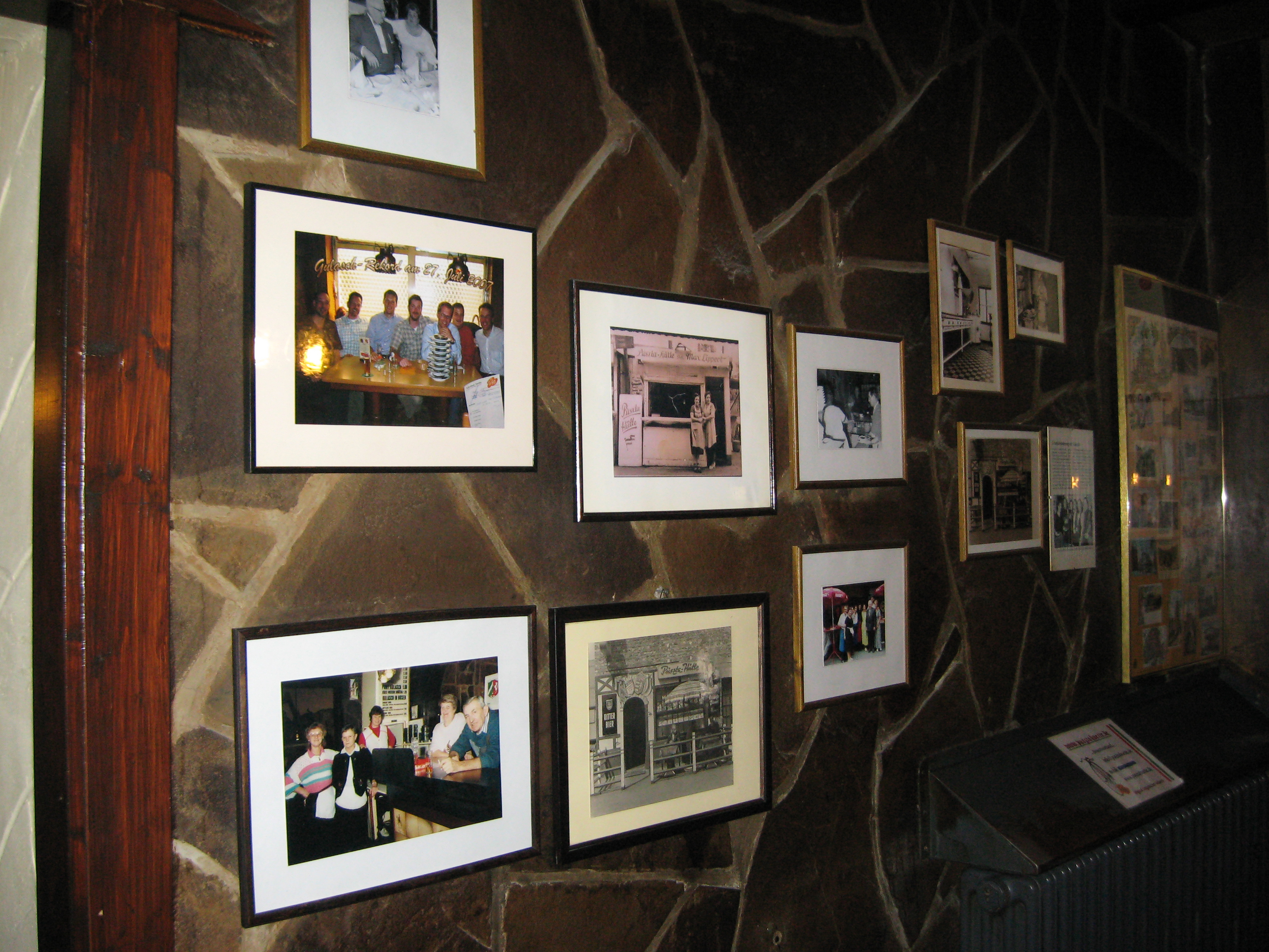 "Historienwand" in der Puszta-Hütte, Köln Datum: 22.01.2011 Urheber: B. Neulich alias Benutzer:Neulich im Roxy Kino Quelle: Privates Fotoarchiv des Urhebers